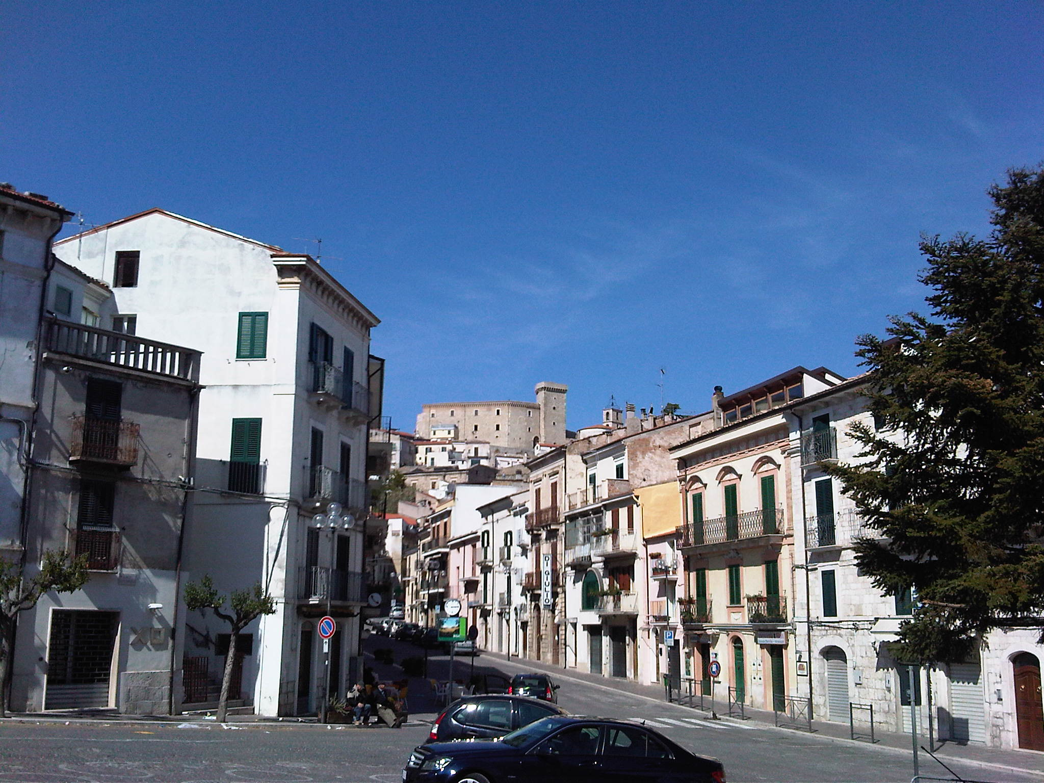 Casoli